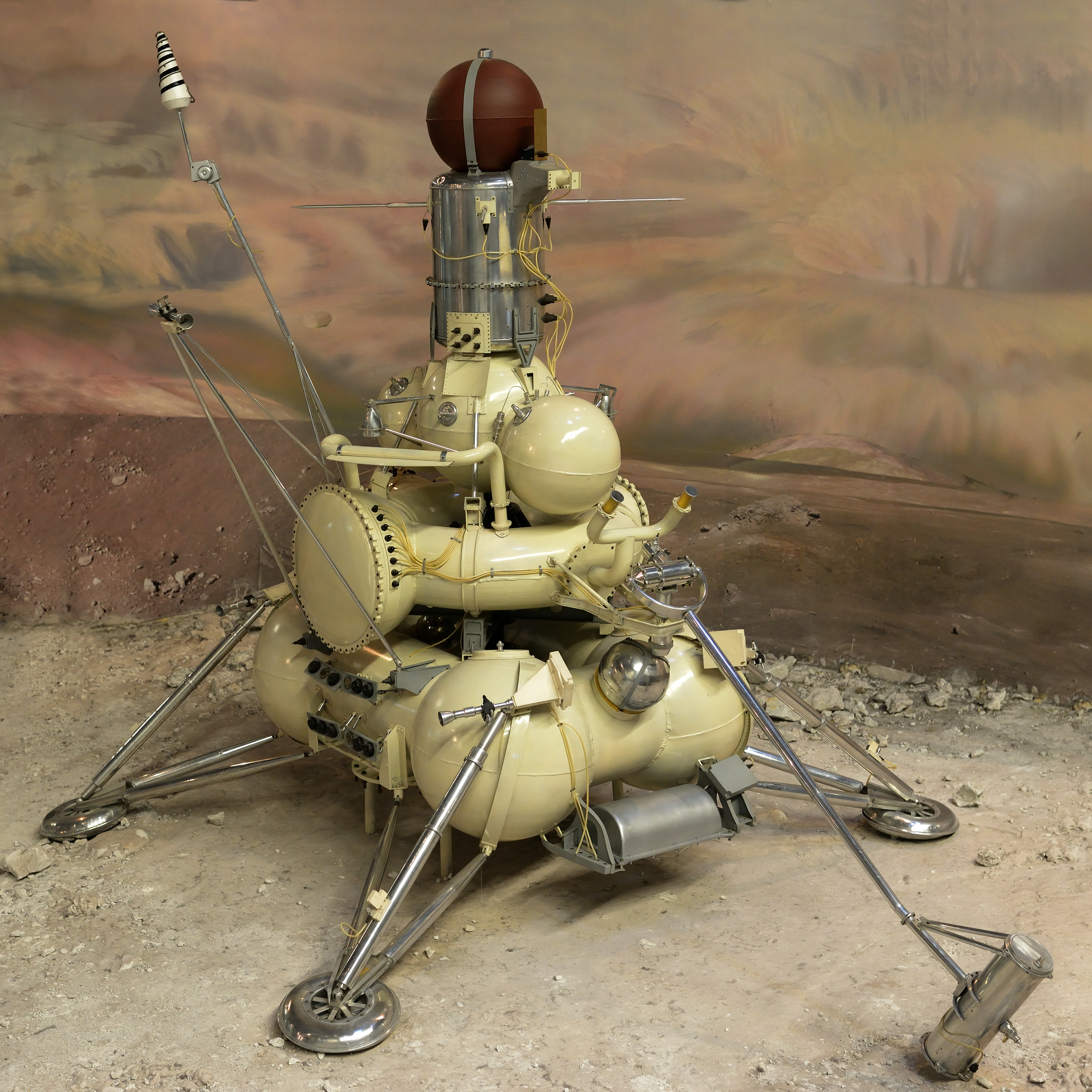 Макет в музее Космонавтики, г.Москва.